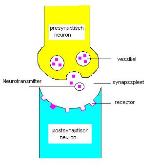 Zelf gemaakt